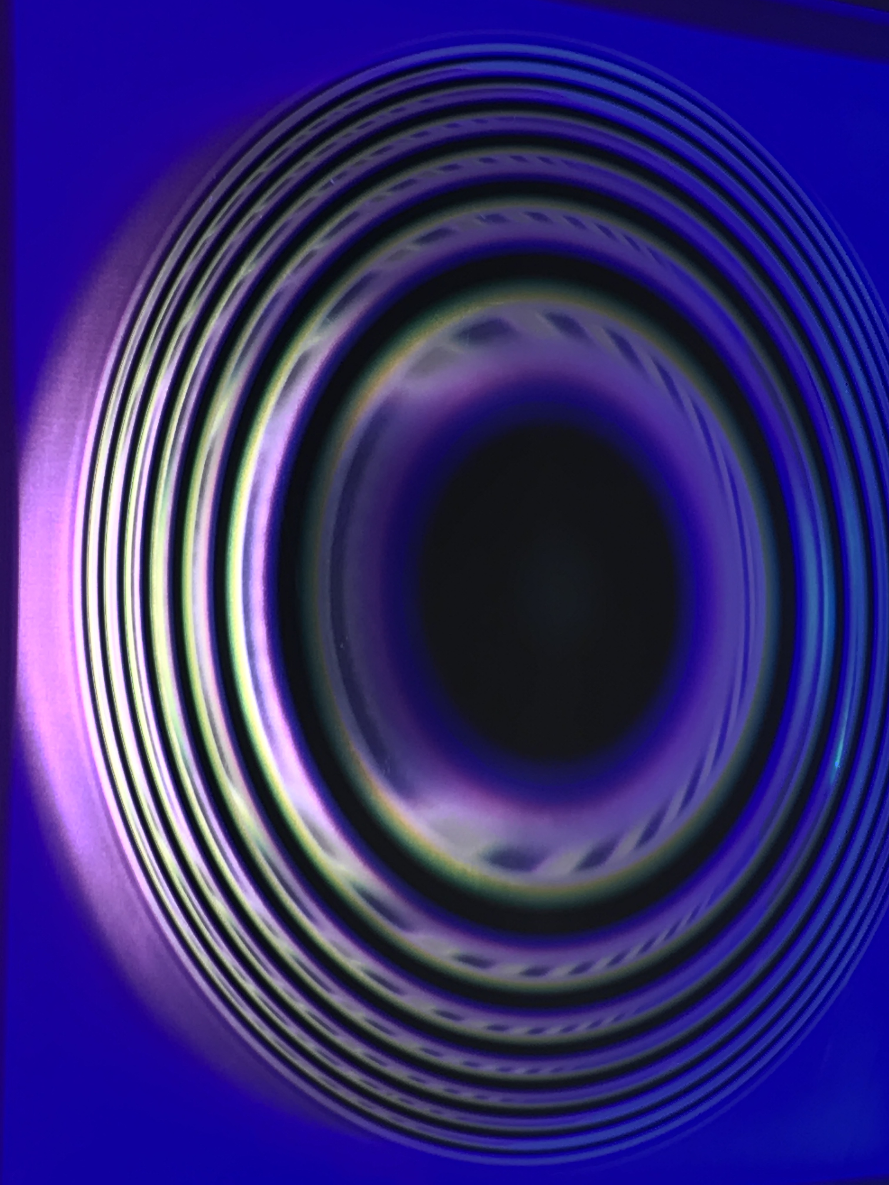 Dispositif visuel & lumineux avec programme intégré, 2017